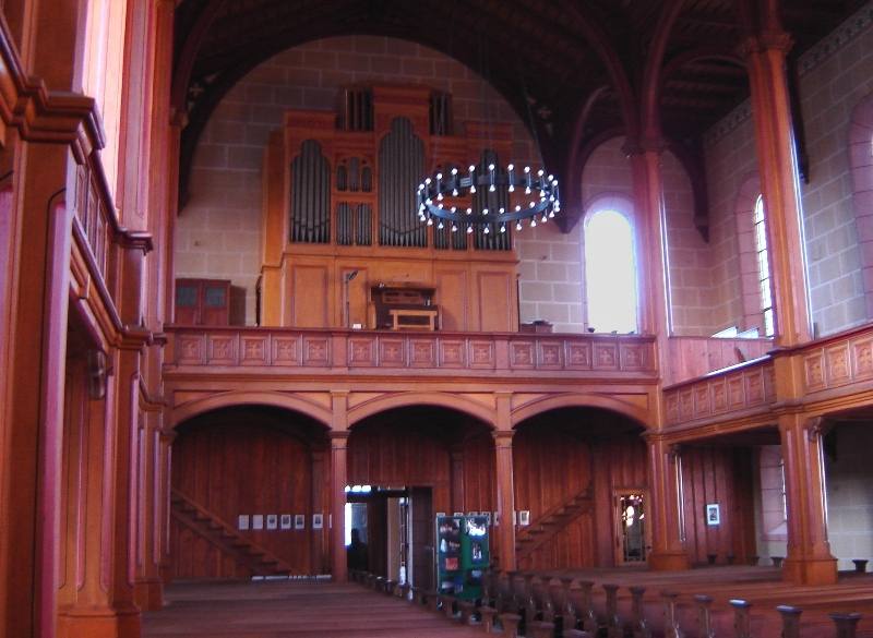 Sankt-Gertrauden-Kirche in Magdeburg-Buckau (innen nach Westen)